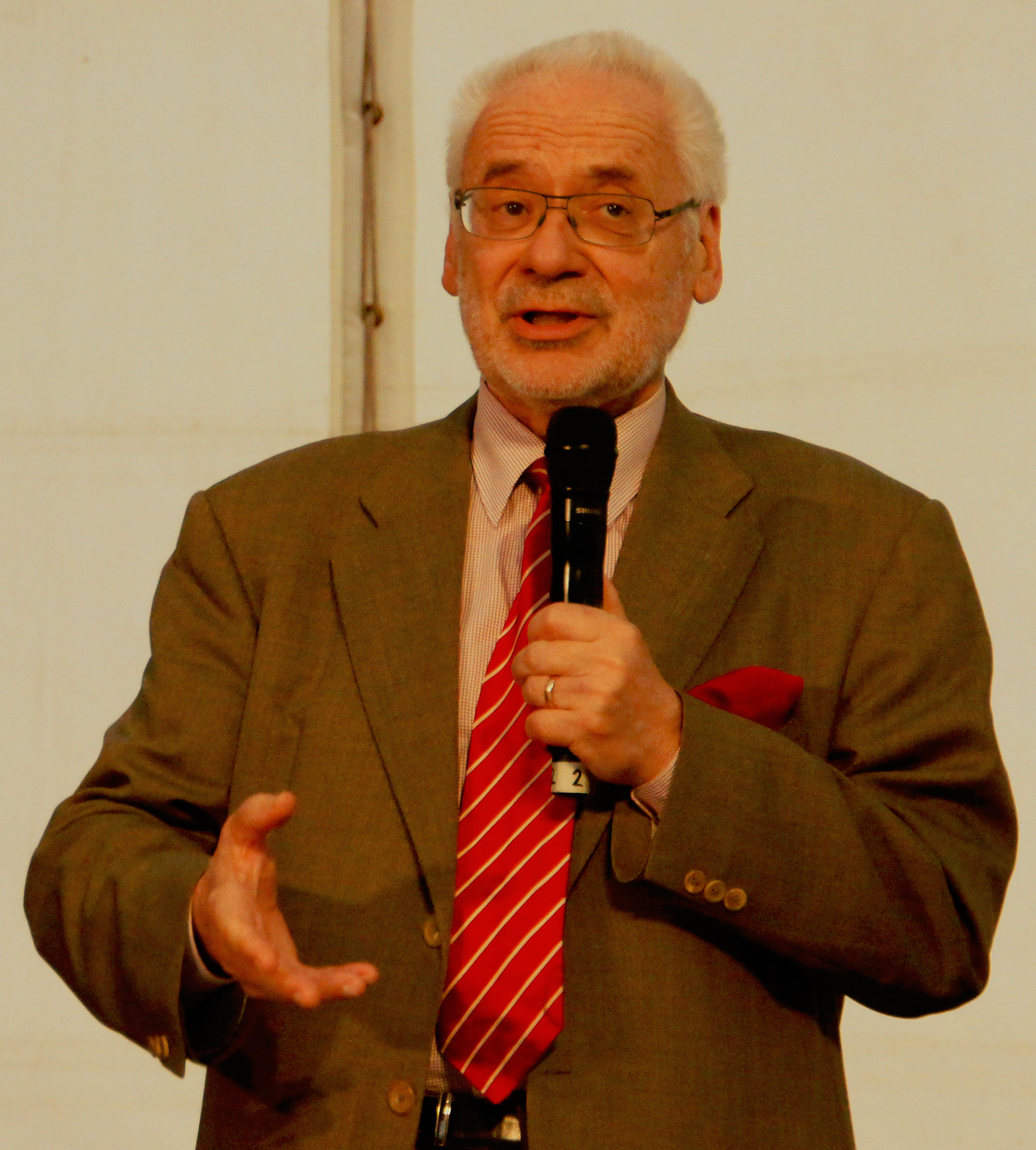 Vienna 2013-05-03 Stadtfest - Dr. Erhard Busek on occasion of opening 'Wiener Stadtfest' 2013